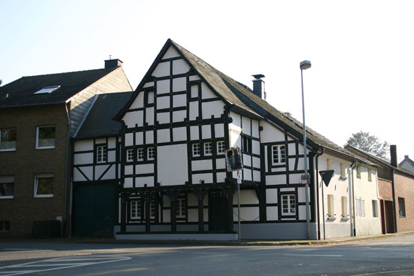 Altes Haus in Elsdorf-Oberembt